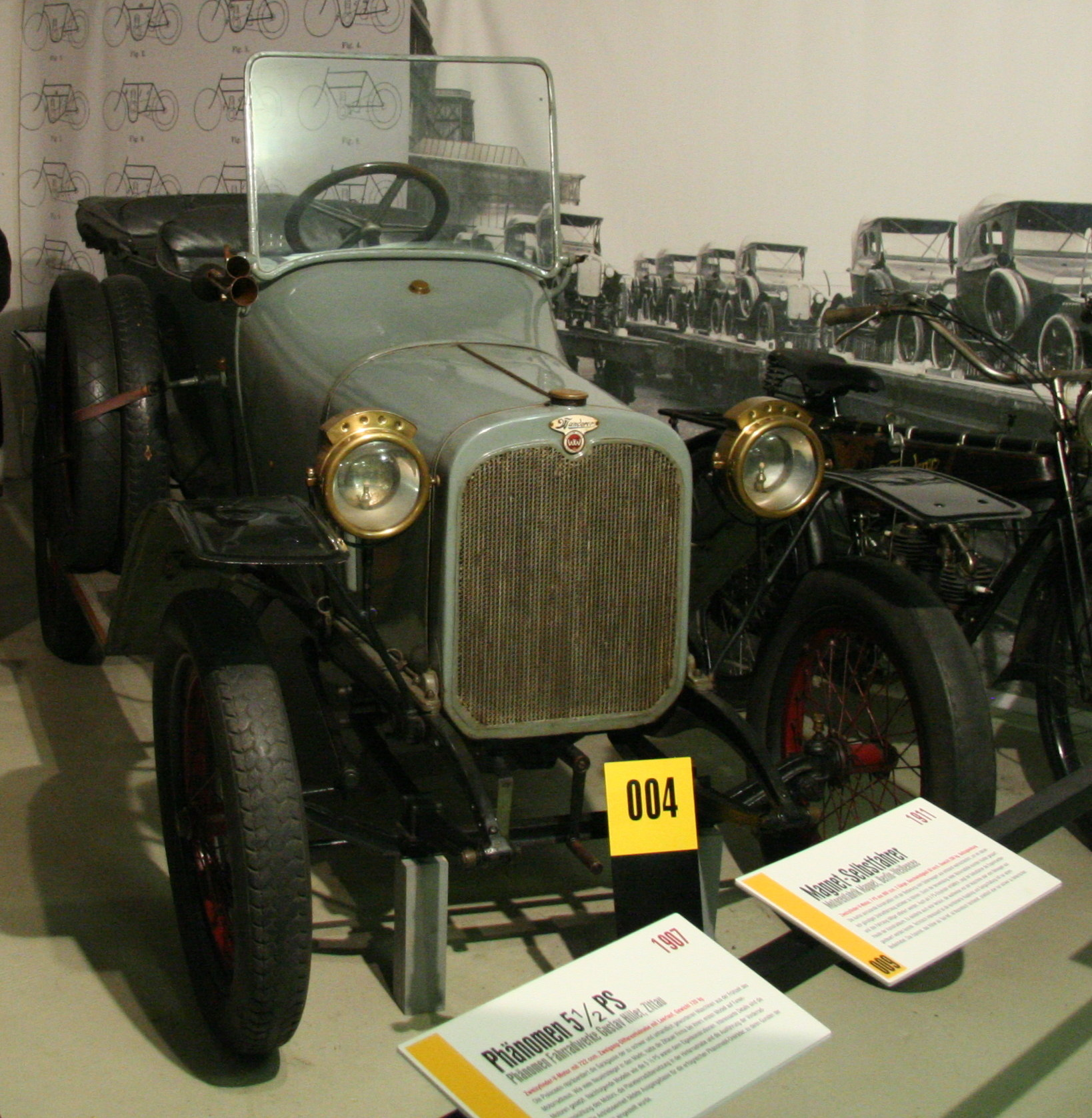 Wanderer W3 5/12, Baujahr 1913 im Museum für sächsische Fahrzeuge in Chemnitz